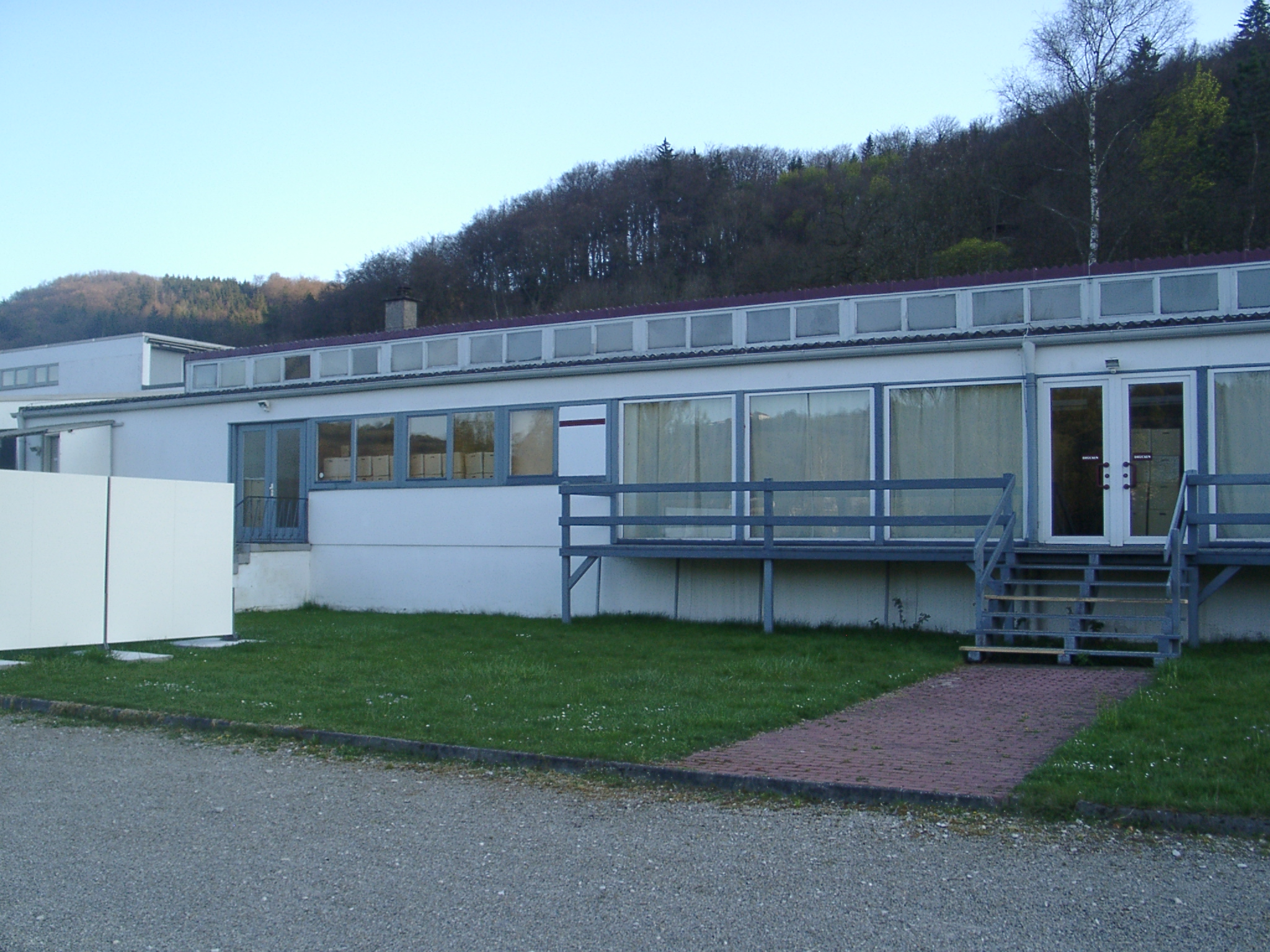 Universitätsbibliothek Eichstätt, Zweigbibliothek Schäfflerhalle